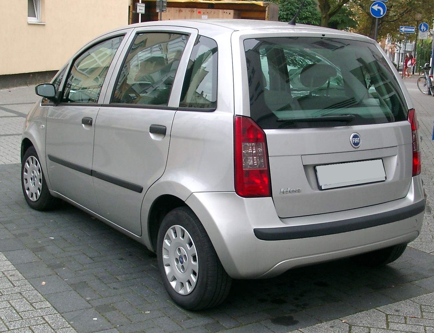 Fiat Idea